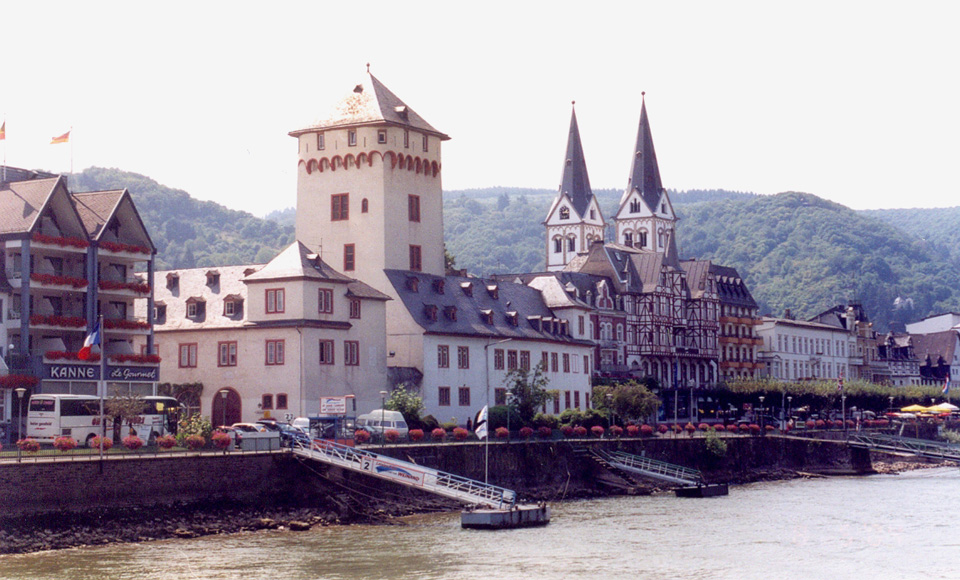 Blick von einem Rheinschiff auf die kurfürstliche Burg von Boppard. Gut erkennbar sind der Turm der Burg und die Franzosenbreche, als das seit der französischen Besatzungszeit fehlende Gebäudestück des zum Rhein hin gerichteten Nordflügels.